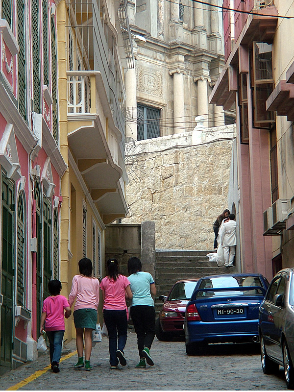 澳門戀愛巷。